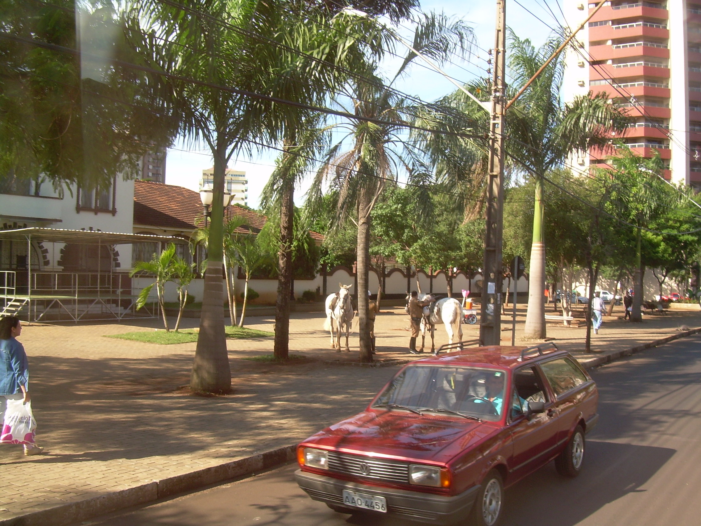 Praça do Mitre no centro de Foz, policia montada ao fundo.